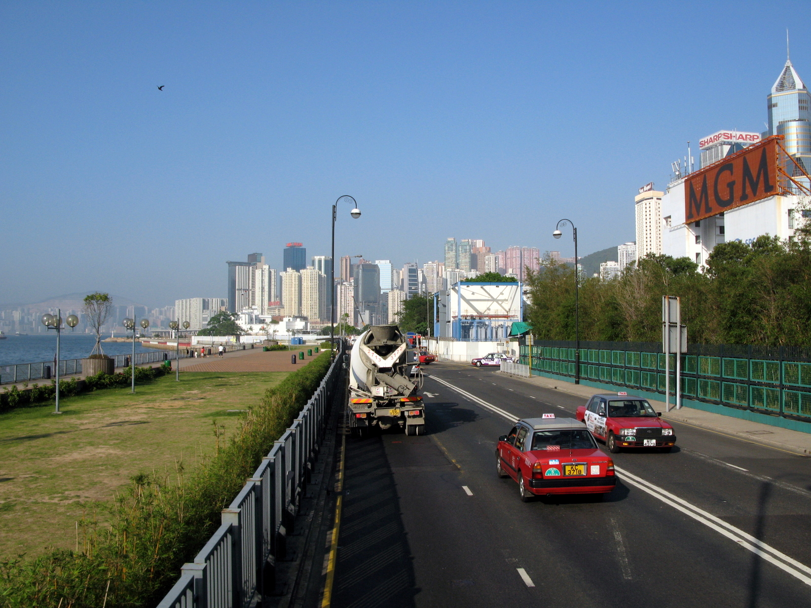 HK Hung Hing Road 鴻興道